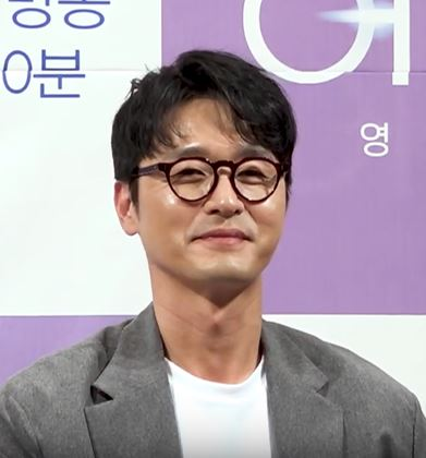 5월 3일 오후 서울 강남구 임피리얼 팰리스에서 tvN 새 월화드라마 ‘어비스’ 제작발표회가 열렸다.